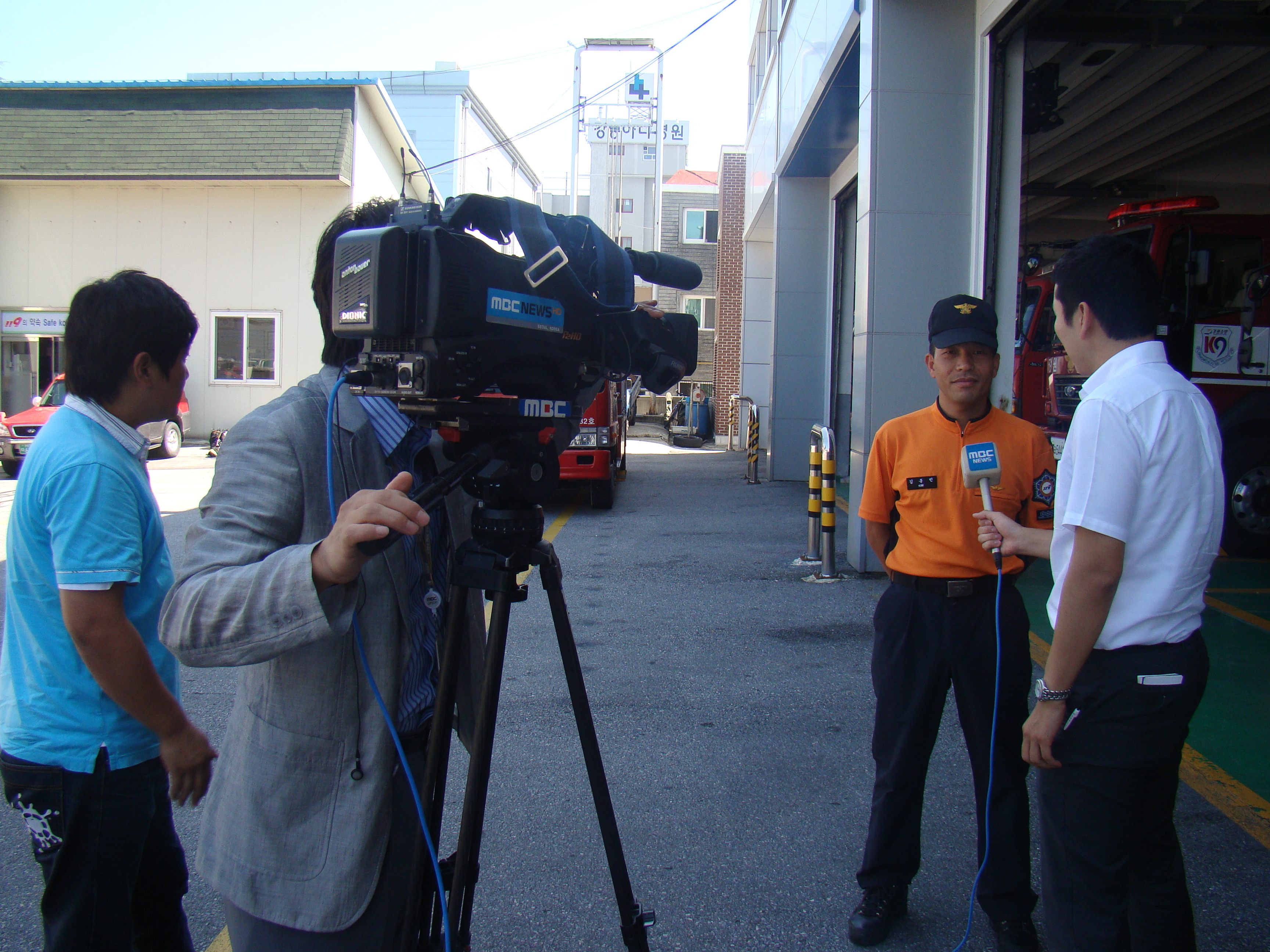 2011년 9월 6일 강릉소방서 김흥빈 강릉MBC 인터뷰